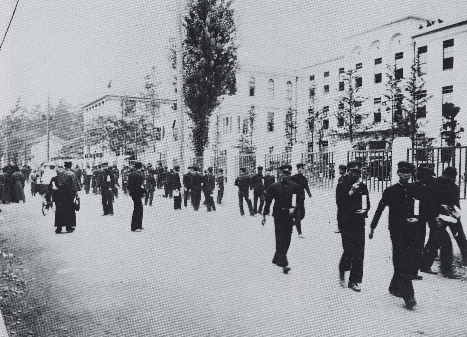 1930年（昭和5年）ころの立命館大学広小路学舎付近